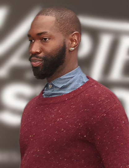 Toronto International Film Festival 2016